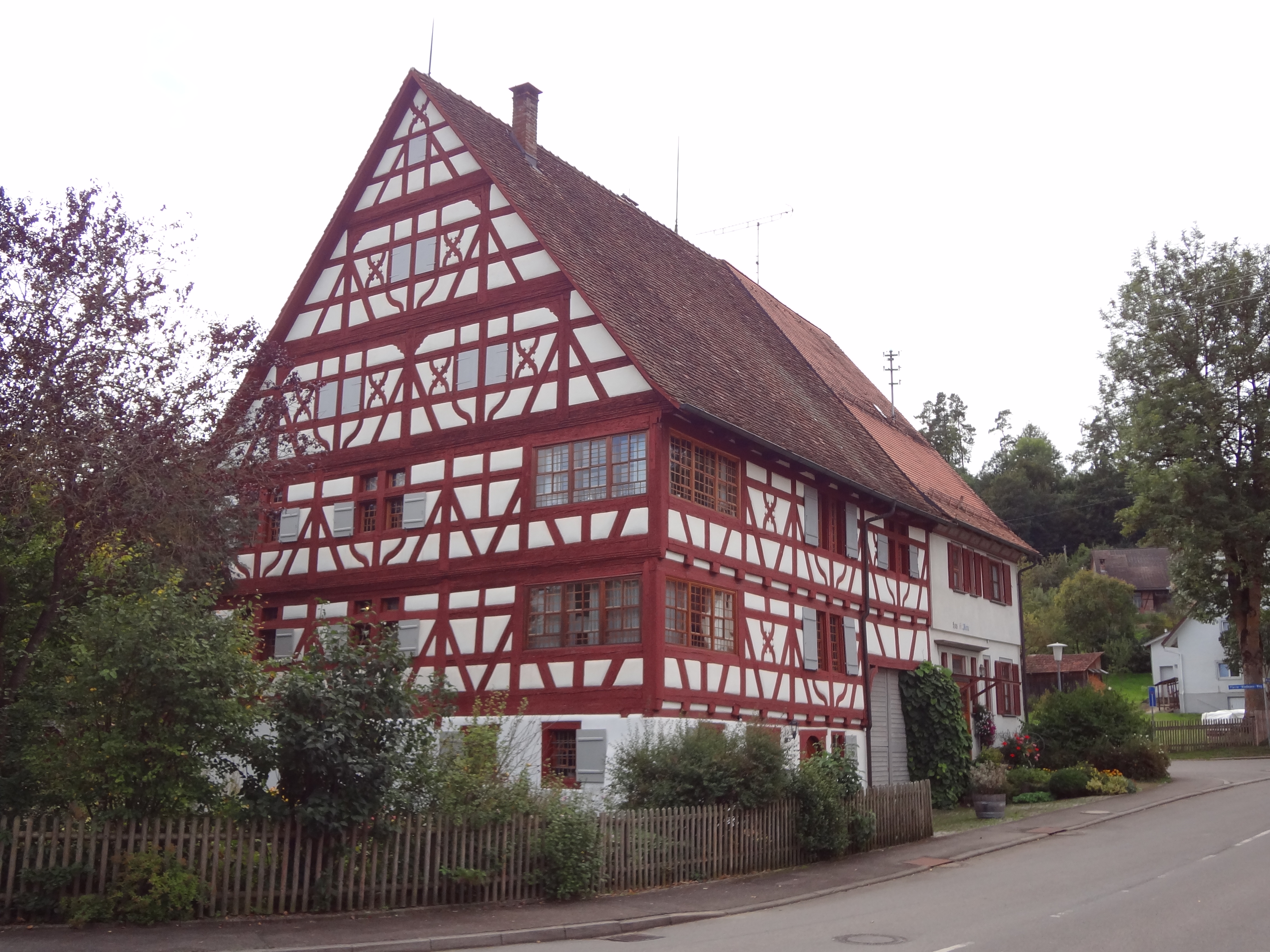 Haus St. Maria, Stetten ob Rottweil, Mariazeller Straße 1